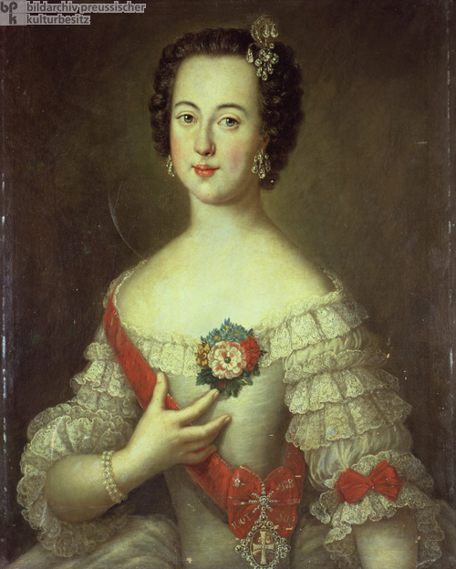 Великая княгиня Екатерина Алексеевна - будущая императрица Екатерина II